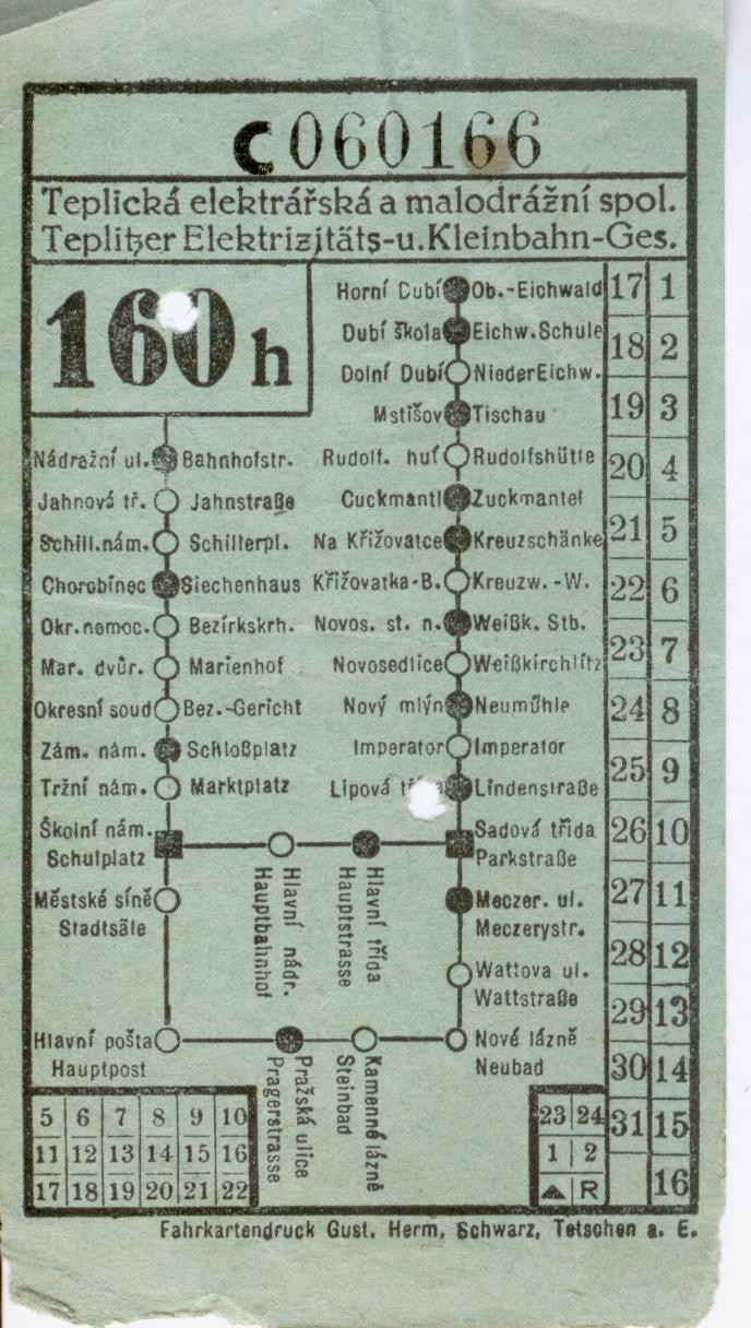 Jízdenka TEKG z období před druhou světovou válkou.